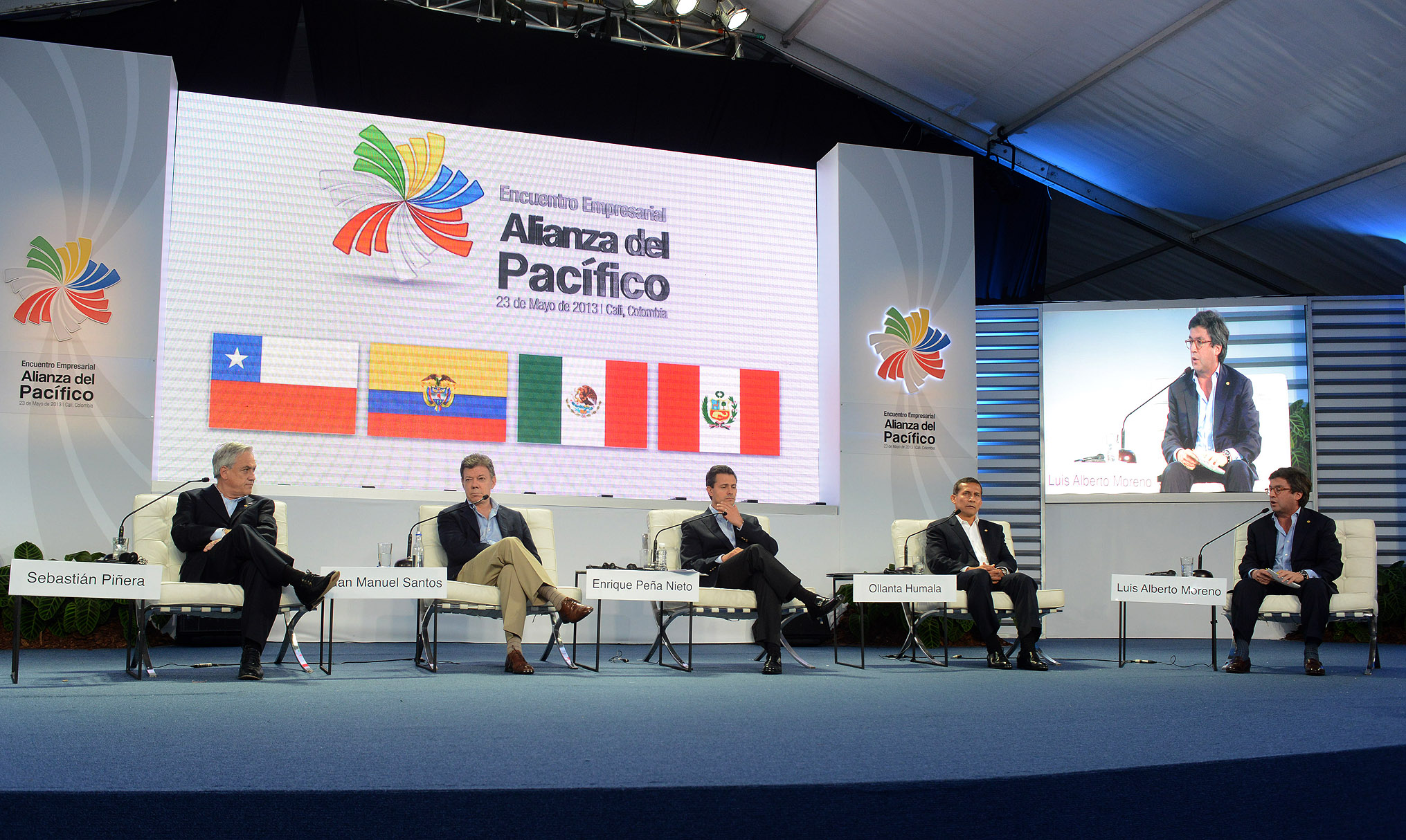 VII Cumbre de la Alianza del Pacífico, Santiago de Cali